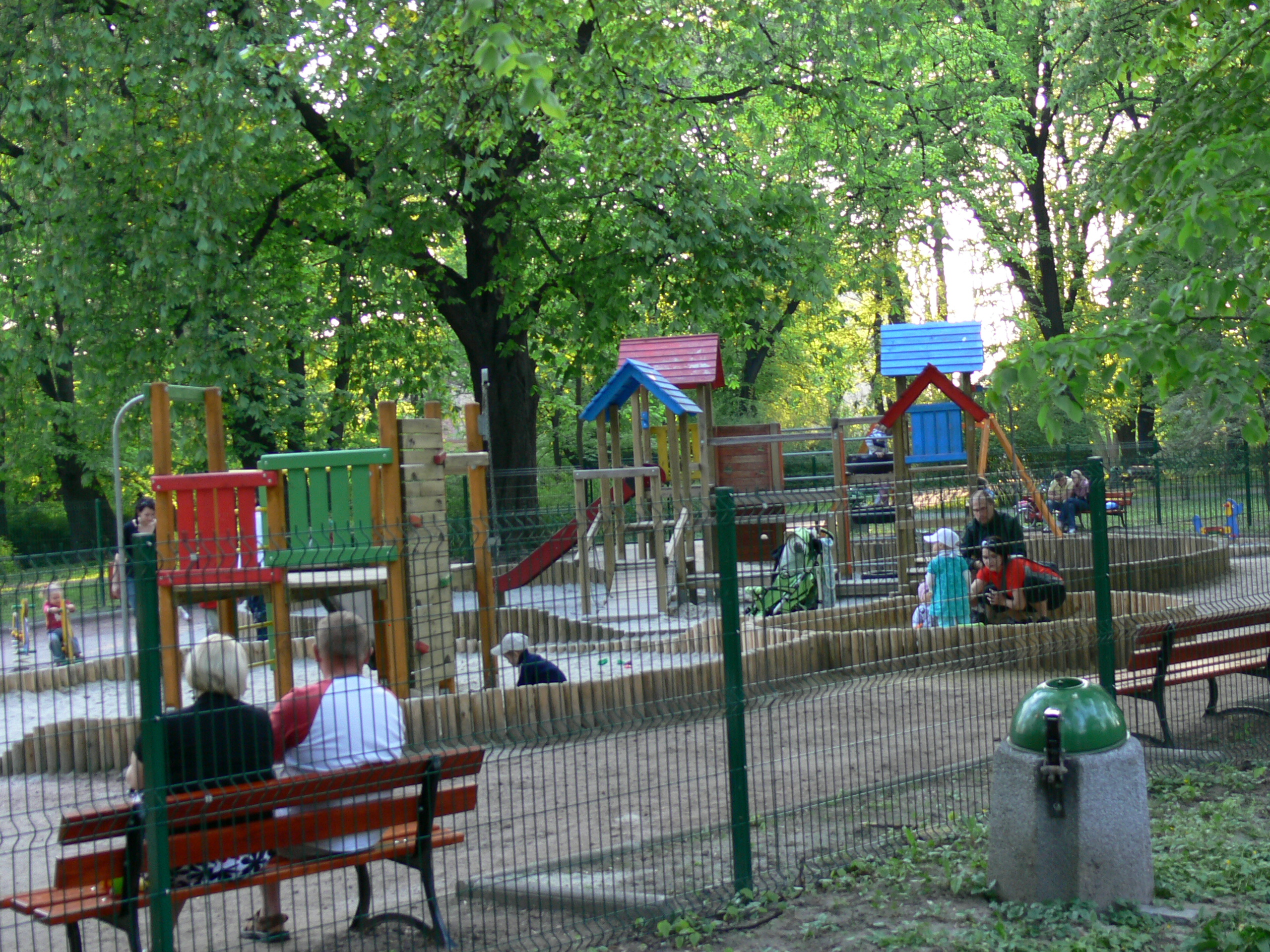 Racibórz — Park im. Miasta Roth: plac zabaw